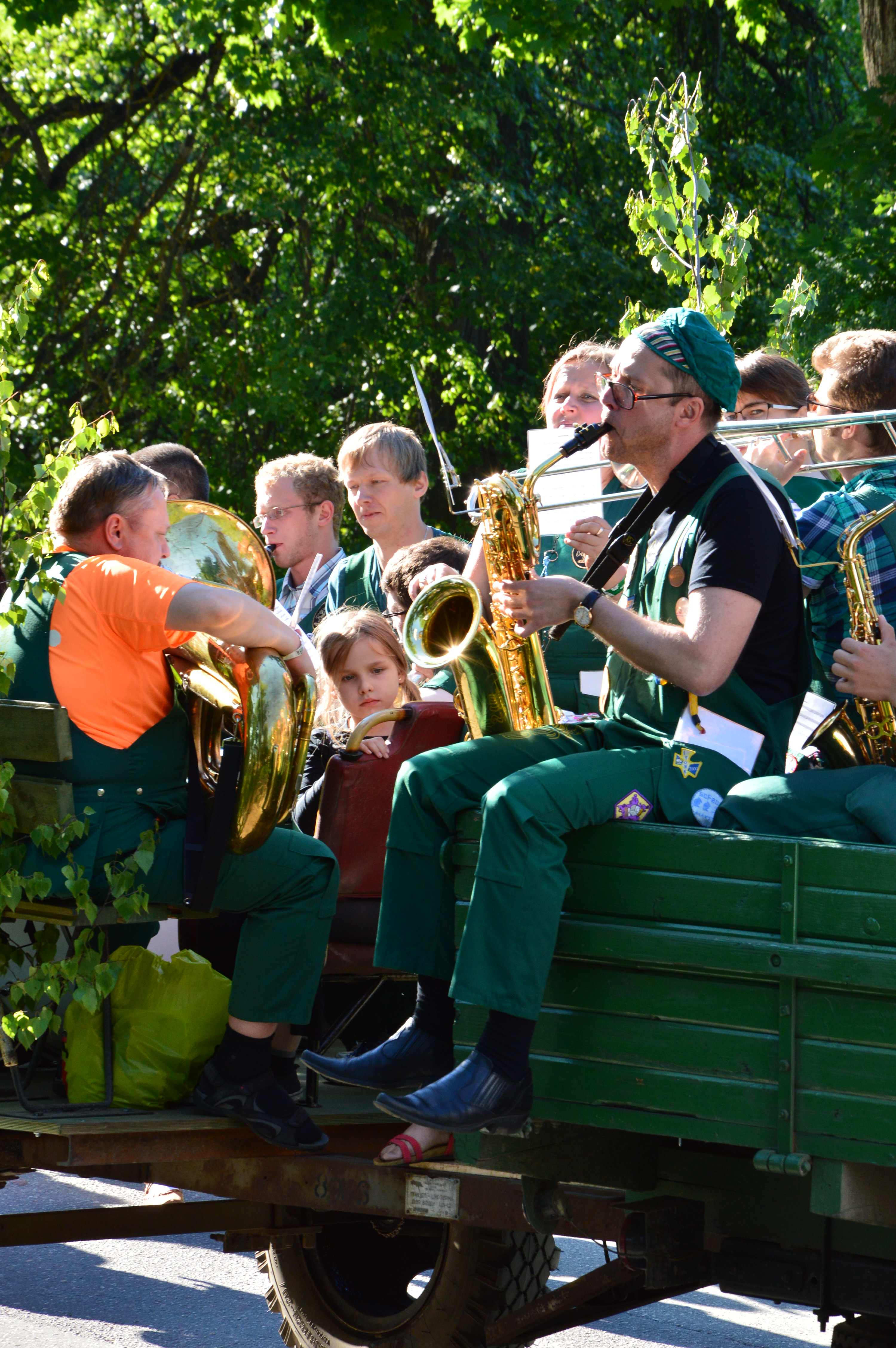 Popsid Tartu laulupeo rongkäigus 2014. aastal.